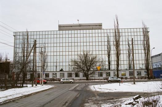 Budynek A